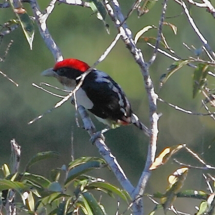 Cabezón brasileño (macho) en Alta Floresta - MT - Brasil